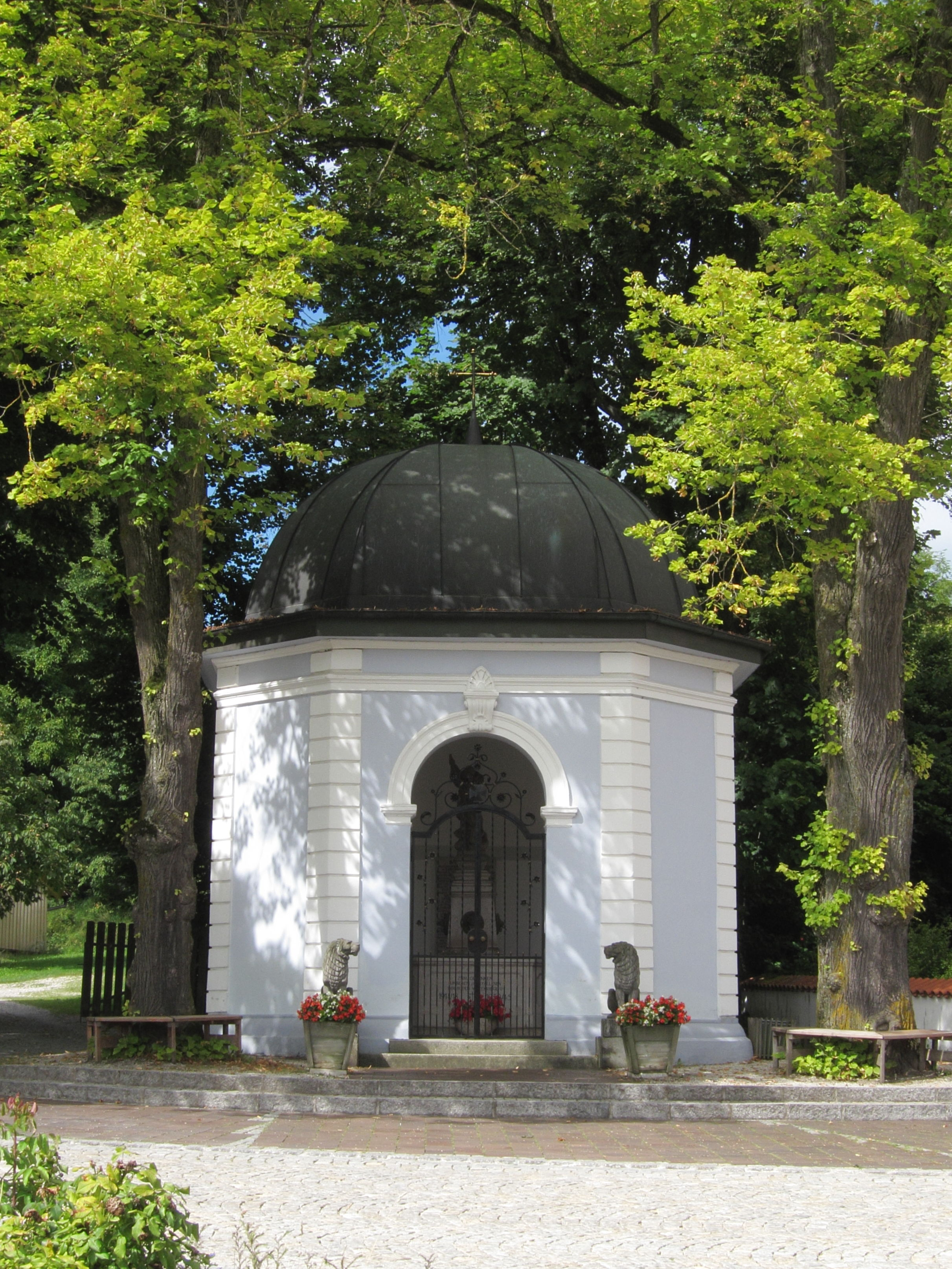 Maria Thalheim; Brunnenhaus mit Kriegergedächtnisstätte, achtseitiger Zentralbau mit Kuppeldach, an Stelle des historischen Wallfahrtsbrunnens errichtet, 1884.